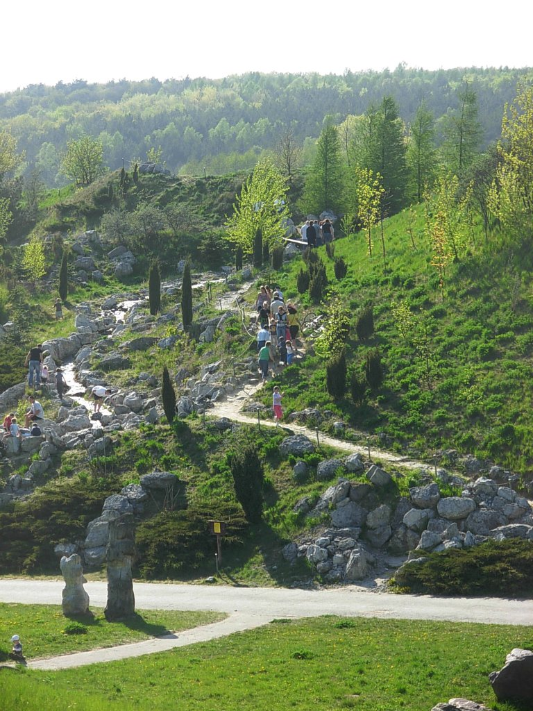 Alpinarium w Myślęcinku